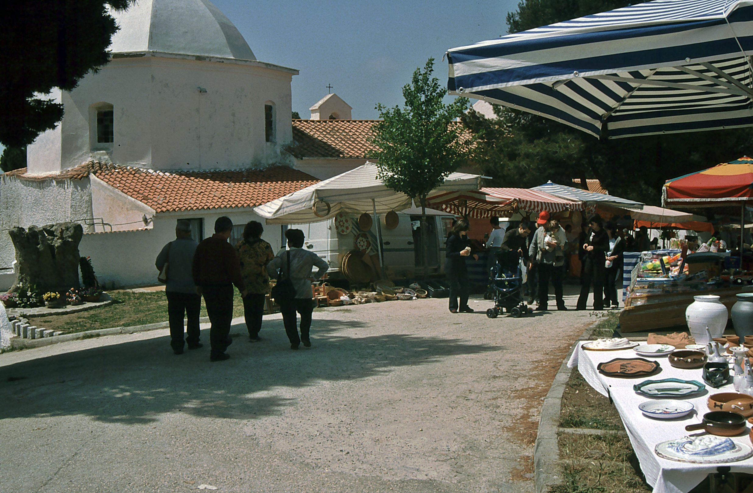 Pilgerfest in Lula (Sardinien): Markt